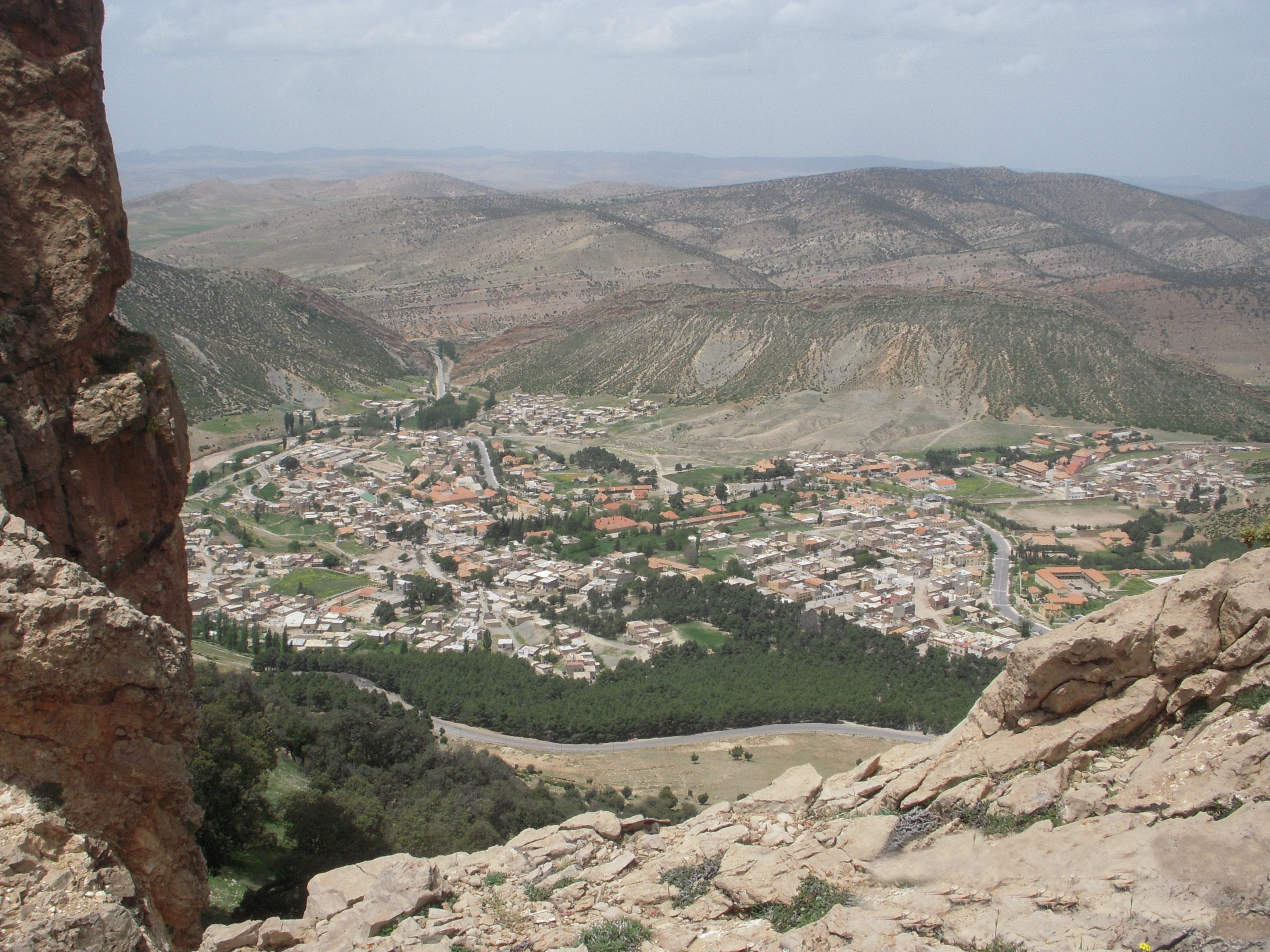 boulemane